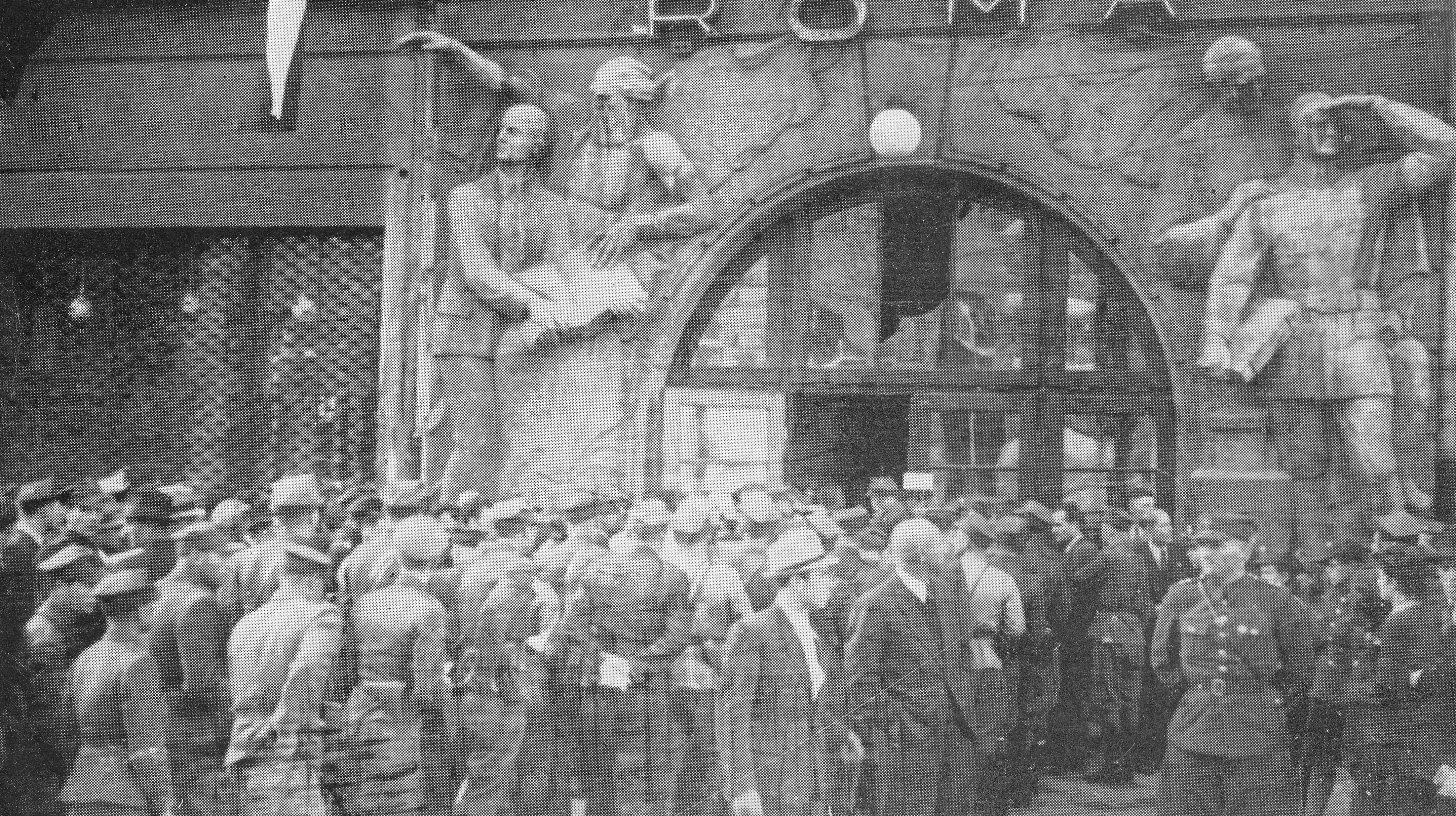 Gmach Romy w Warszawie. I Kongres Byłych Więźniów i Uczestników Walk Zbrojnych o Niepodległość i Demokrację